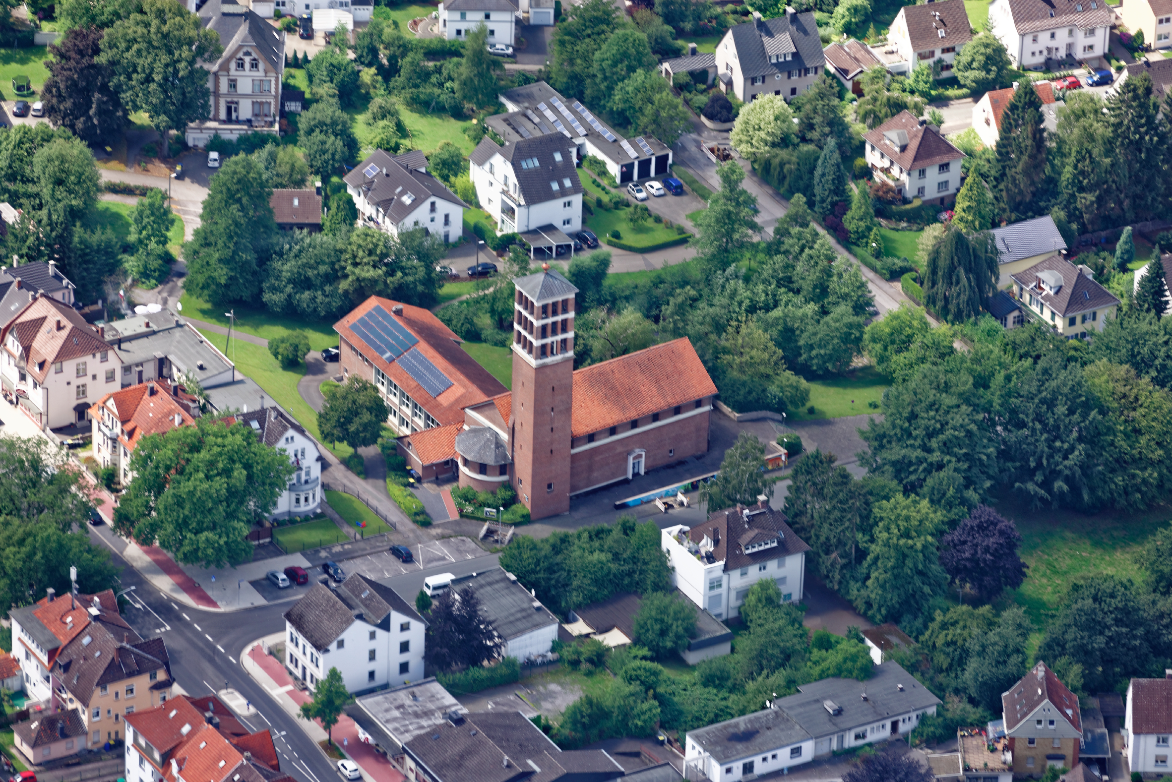 Luftaufnahme: Evangelische Erlöserkirche in Iserlohn-Wermingsen, Westfalenstraße/Ecke Im Wiesengrund.